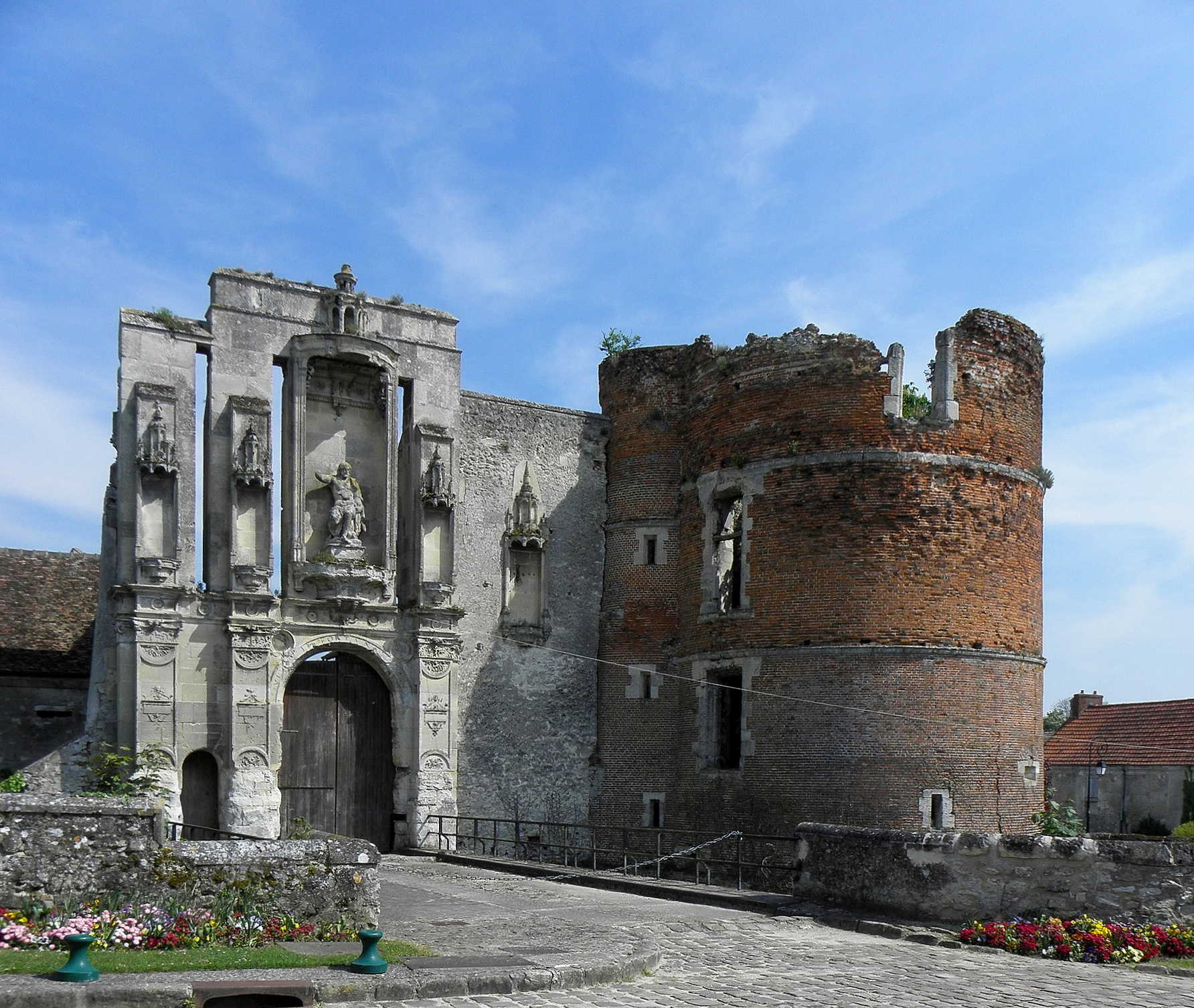 Château de Nantouillet (77).